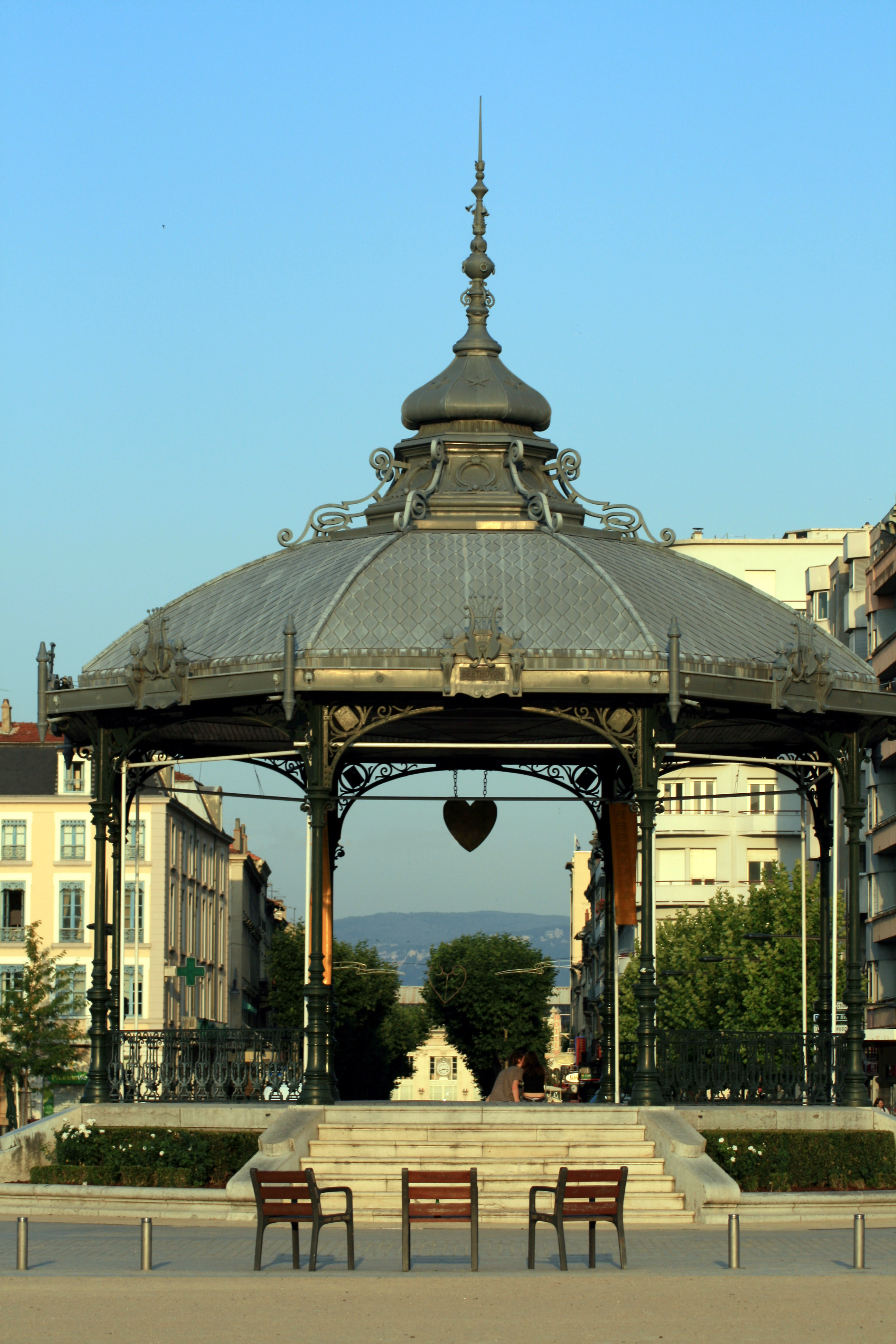 kiosque des amoureux dit "Peynet" (Valence,FR26)